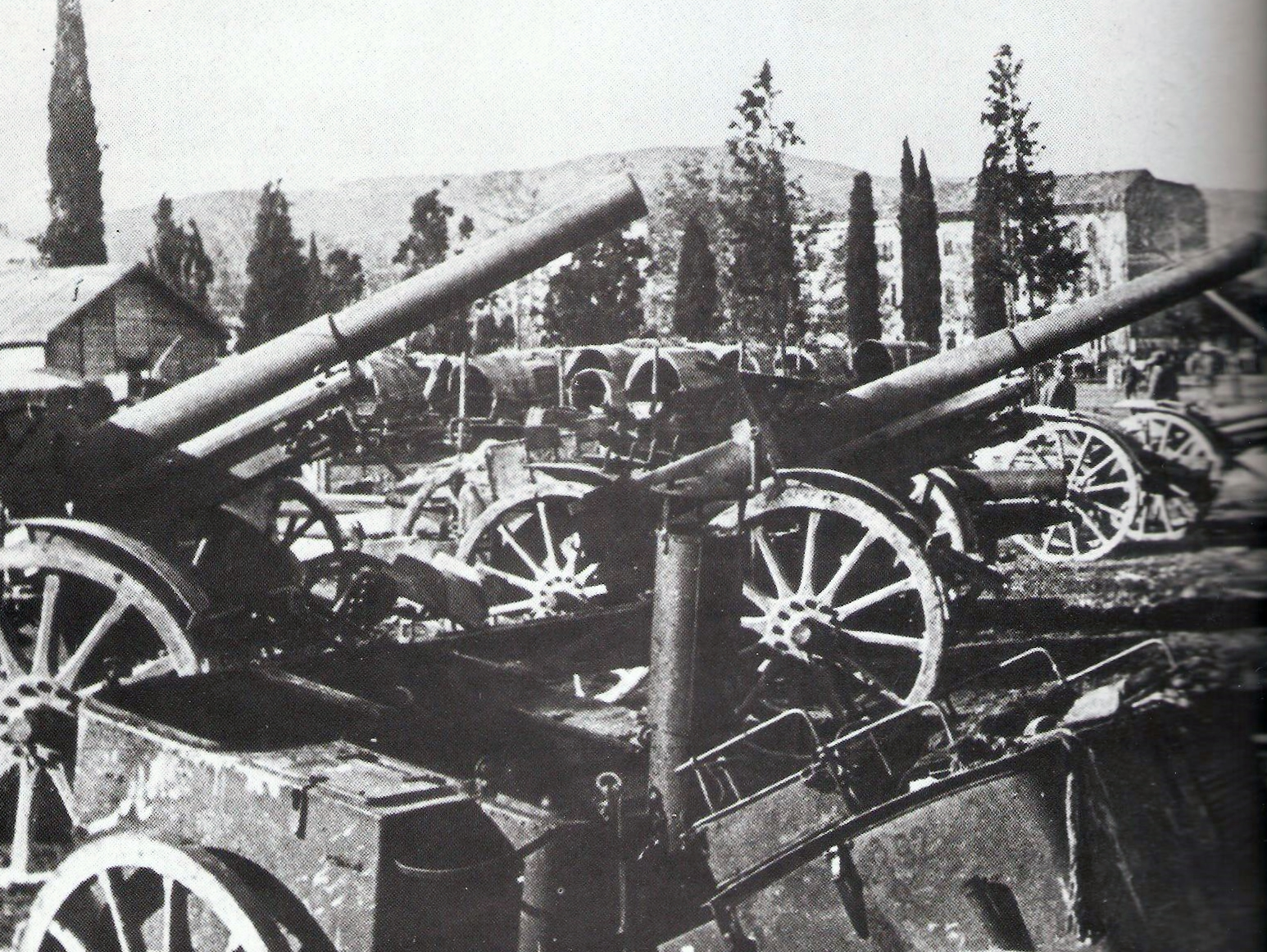 Artiglierie e mezzi militari austro-ungarici catturati dagli italiani nella battaglia di Vittorio Veneto